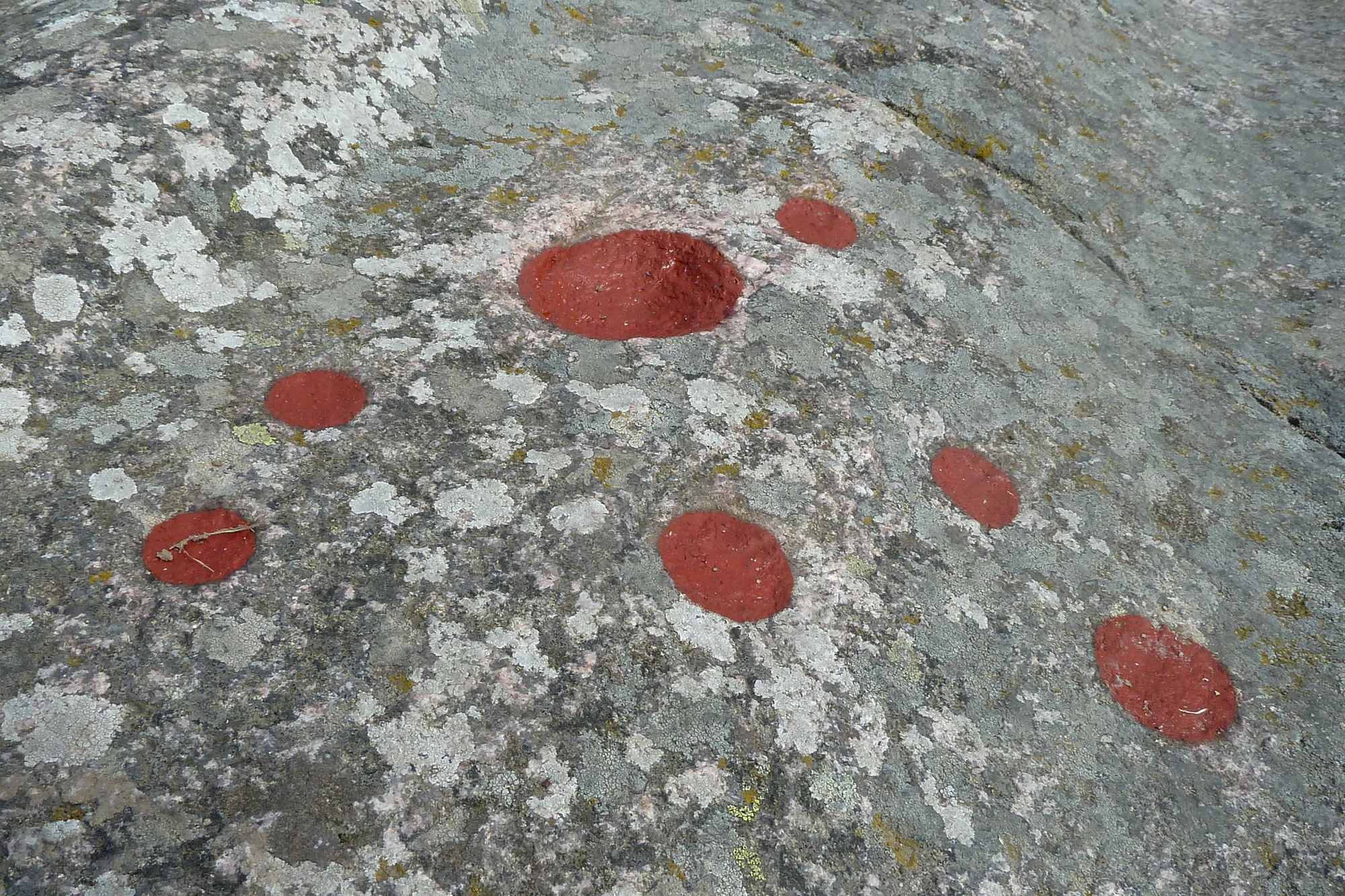 Felsritzungen Madsebakke auf Bornholm: Schalengruben